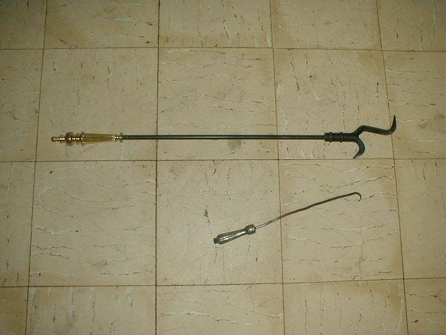 Walon: 2 graweyes